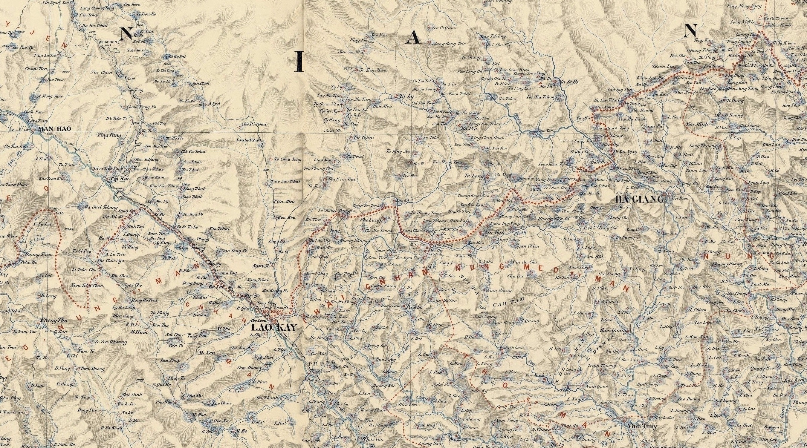 Bản đồ vùng Tụ Long trên biên giới Việt Nam - Trung Quốc năm 1902.